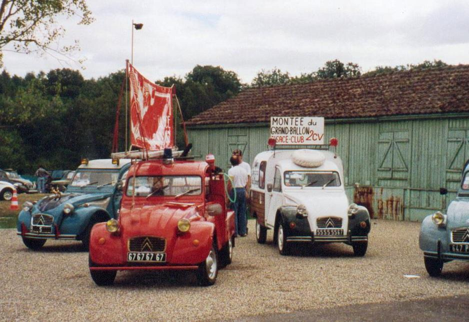 Véhicule mascotte du musée du Framont. Cliché personnel Catégorie:2CV